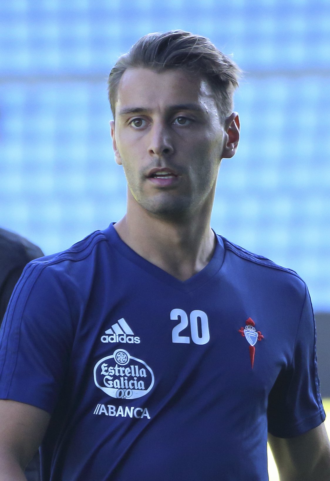 Presentación RC Celta - Temporada 18/19